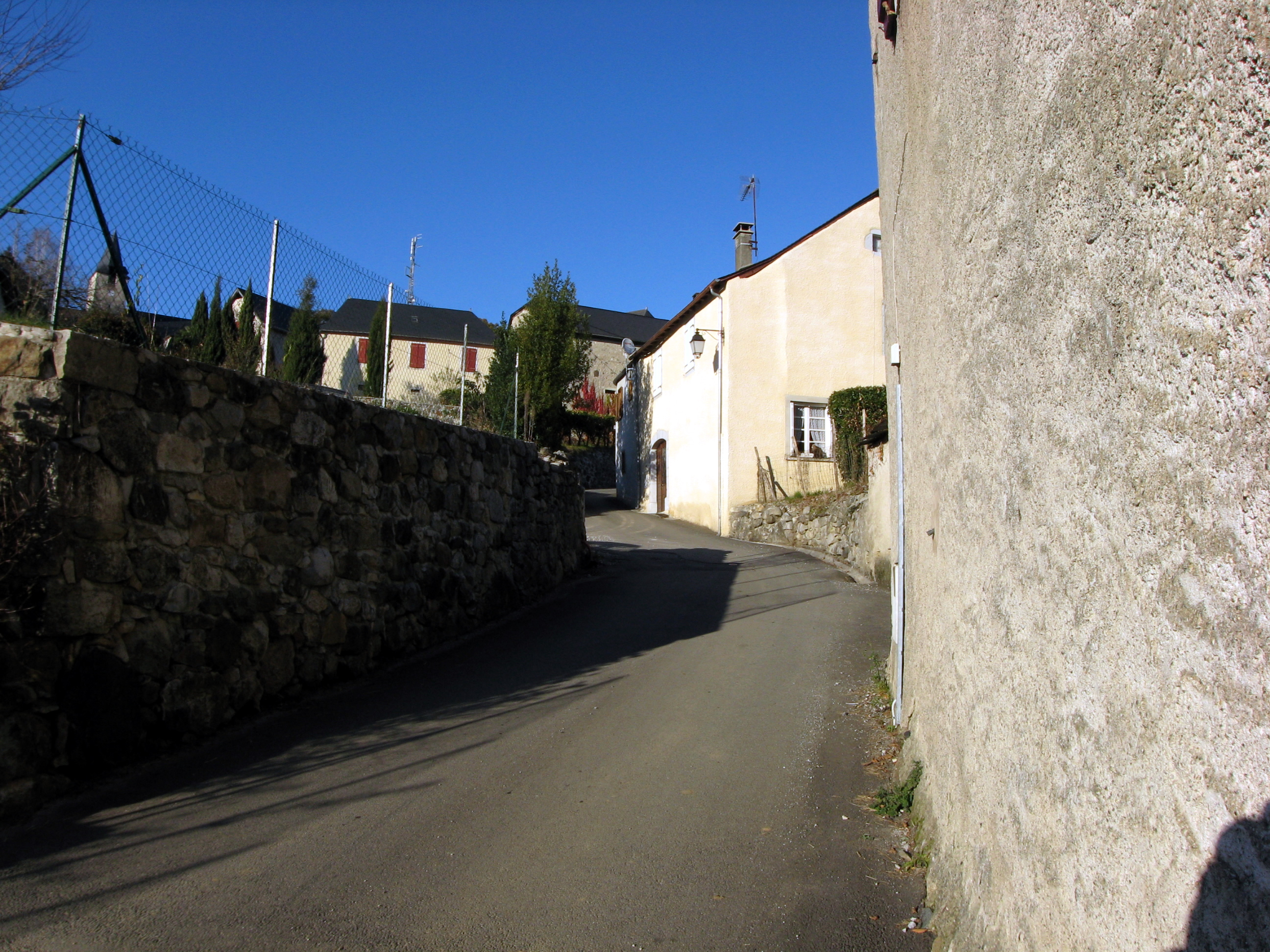 Rue étroite et pentue de Bescat (Pyrénées-Atlantiques) (Pyrénées).